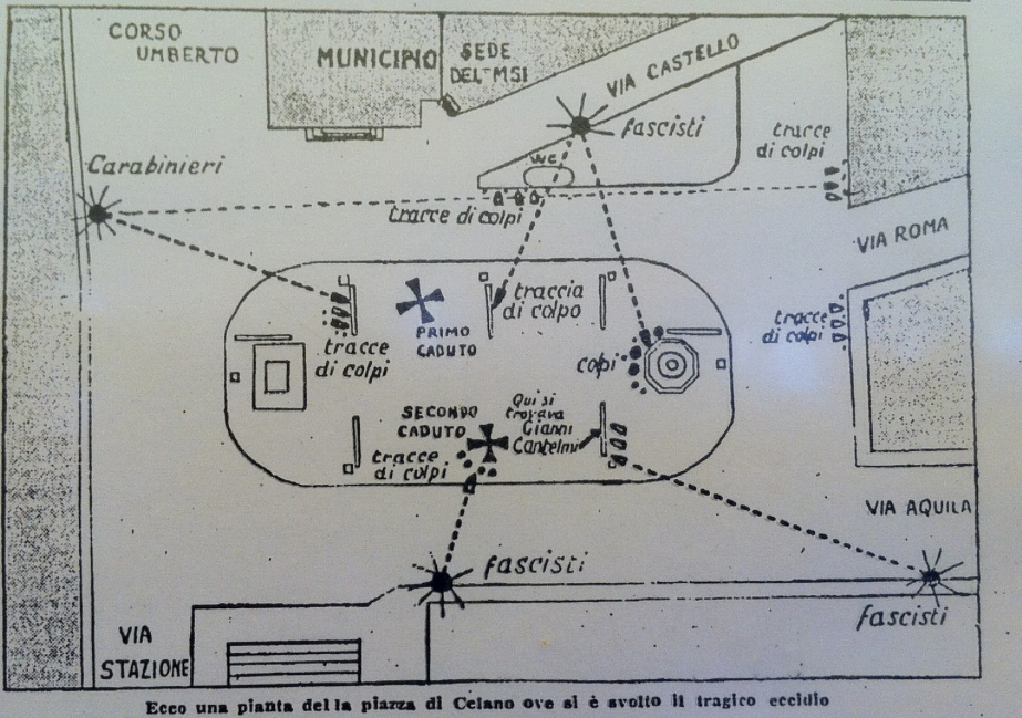 Ricostruzione dell'accaduto durante l'Eccidio di Celano